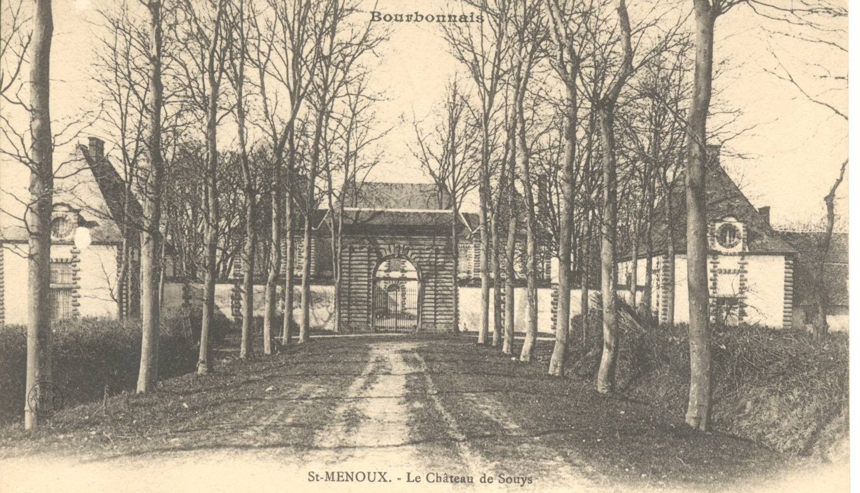 Allée plantée d'arbres menant au portail de l'entrée de la cour d'honneur du Château de Souys à Saint-Menoux. Plein cintre, ordonnance ionique et traitement en bossages.